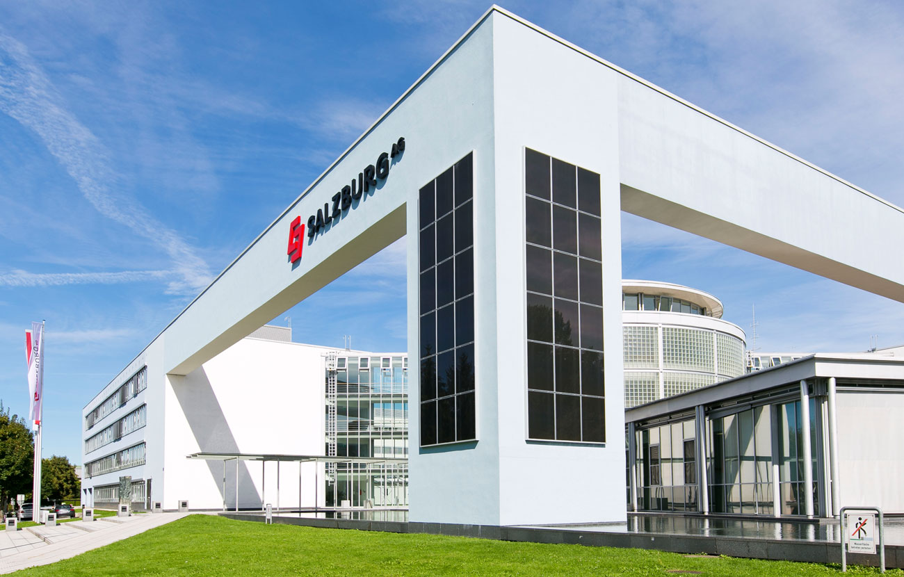 Hauptgebäude / Direktion der Salzburg AG